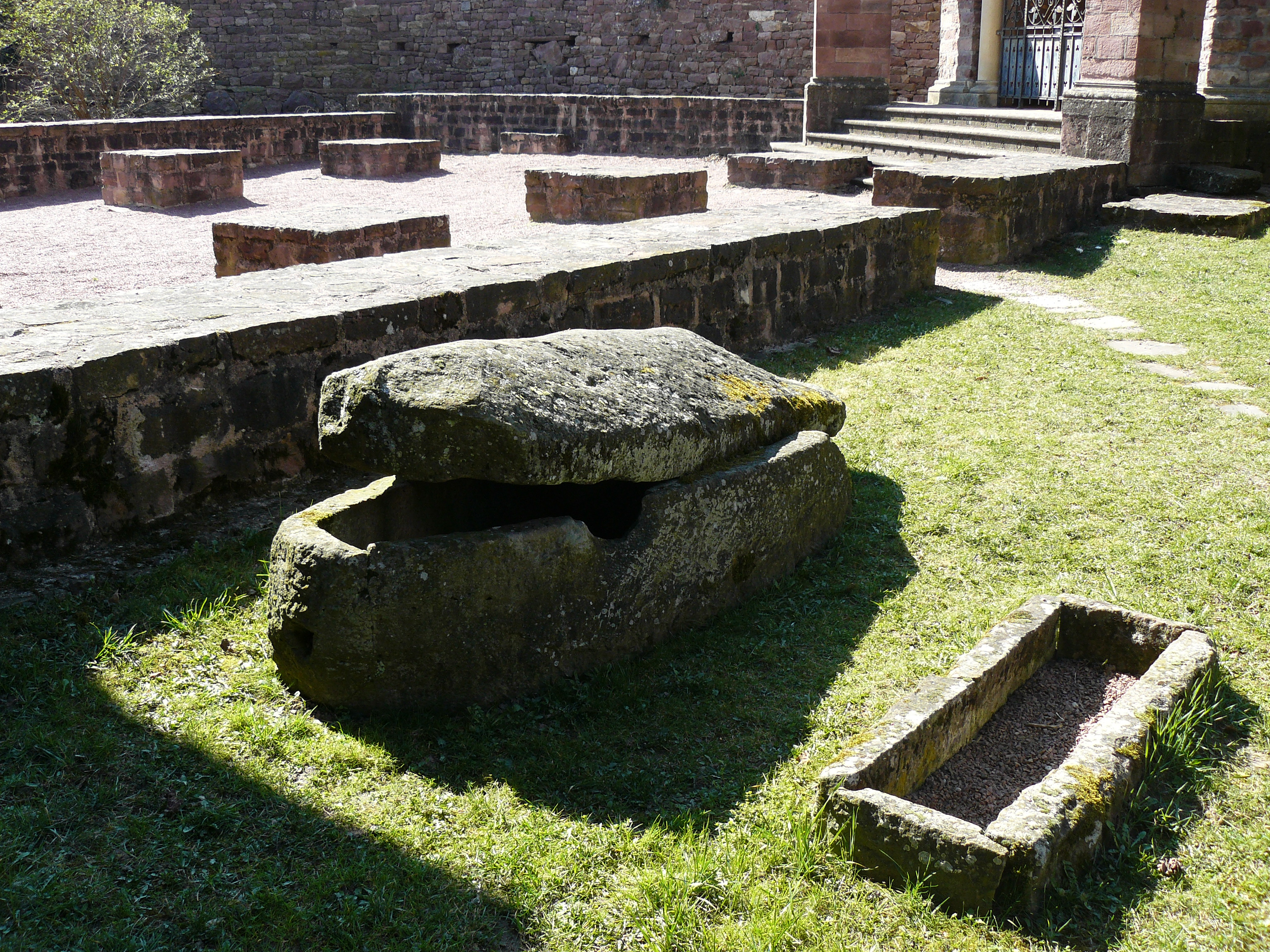 Sarcophage mérovingien situés derrière l'église de Gueberschwihr